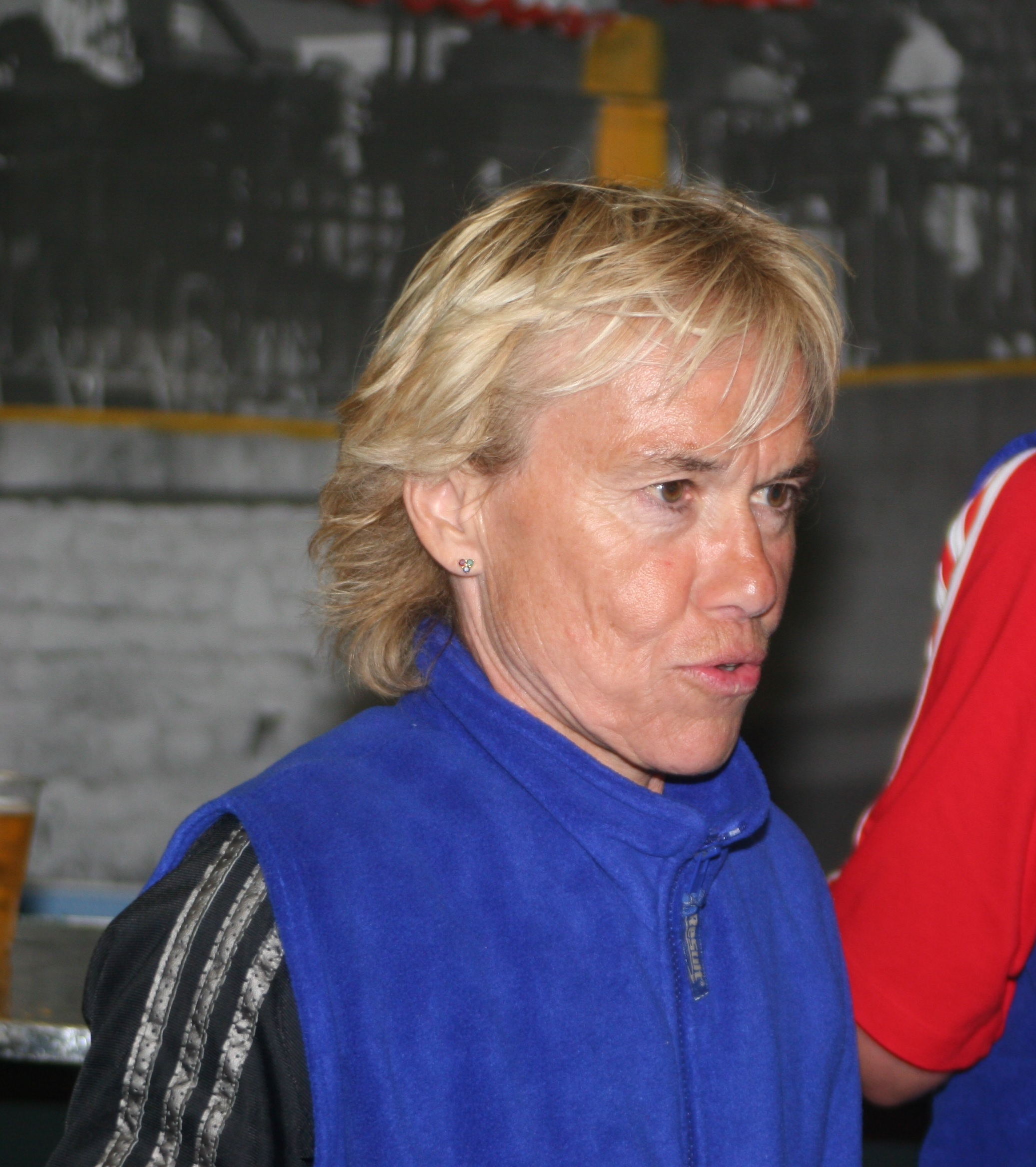 langlacé